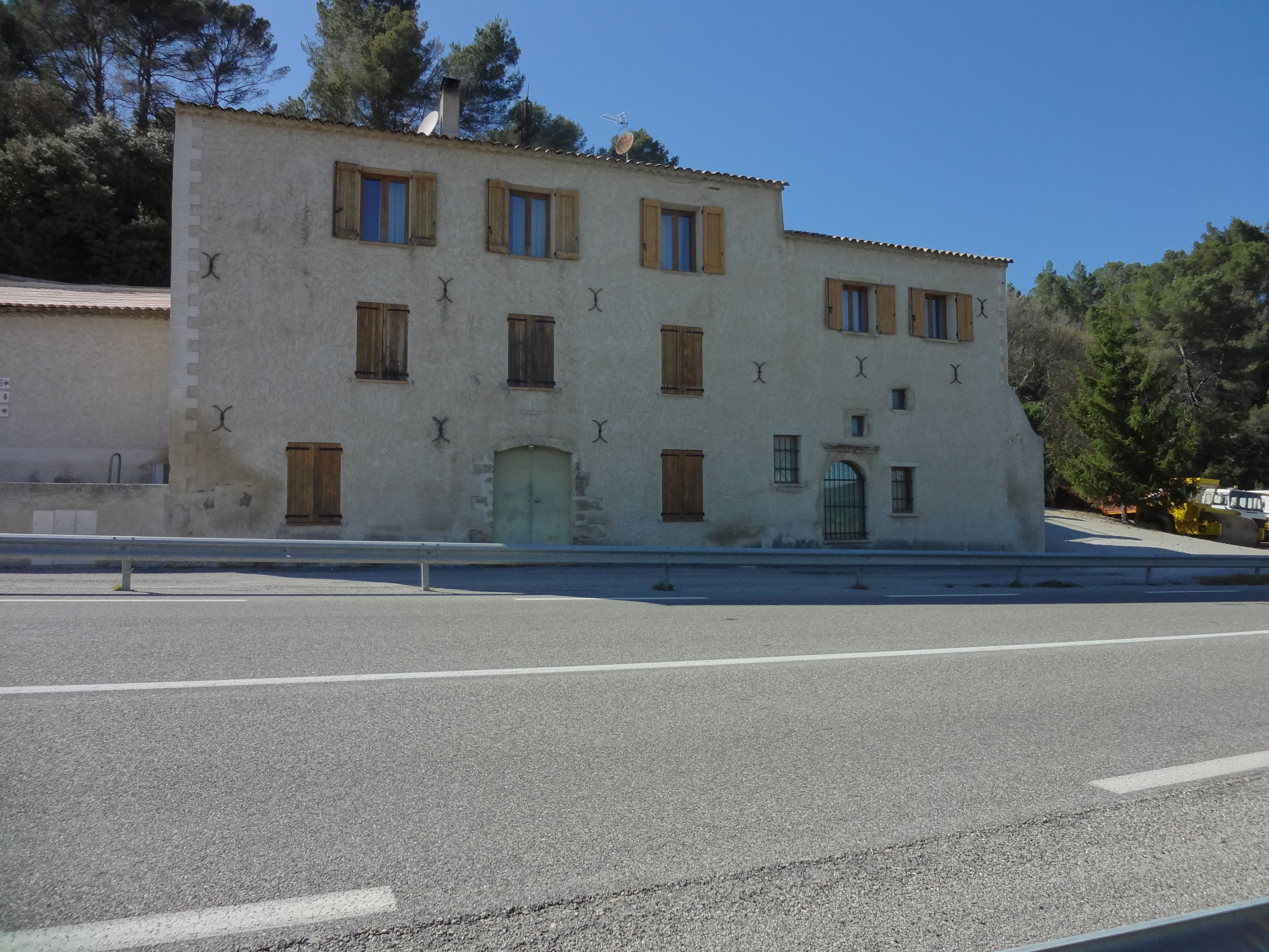 Relais de poste de Giropey, sur l’ancienne route nationale 96 (commune de Lurs, France)